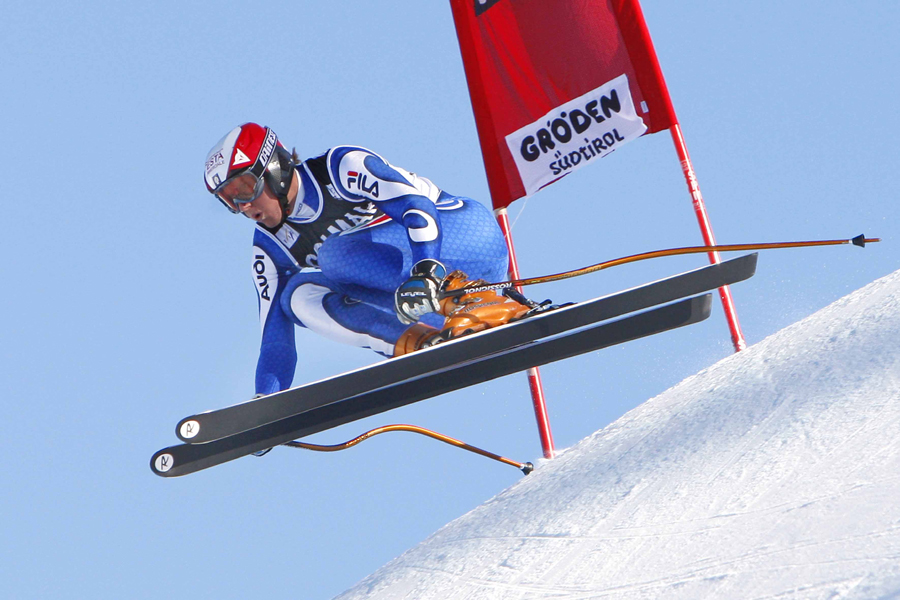 Werner Heel in Groeden